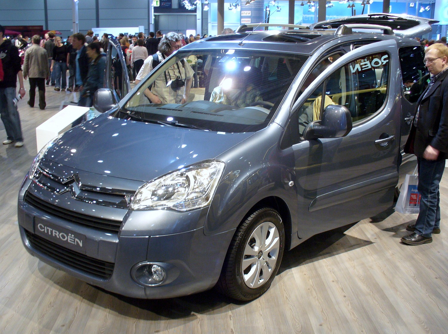 Citroën Berlingo